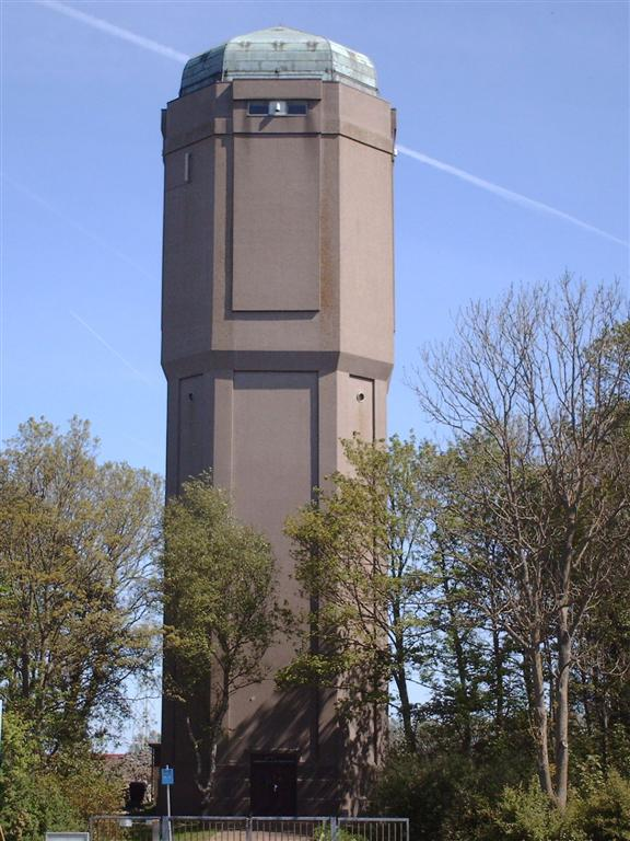 Watertoren Bolsward